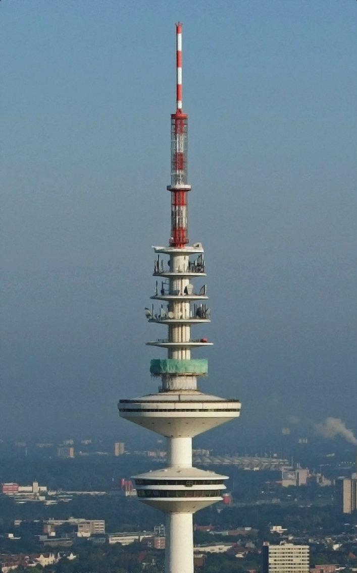 Heinrich-Hertz-Turm in Hamburg-St. Pauli. This is a photograph of an architectural monument.